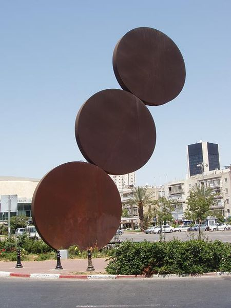 Sculpture